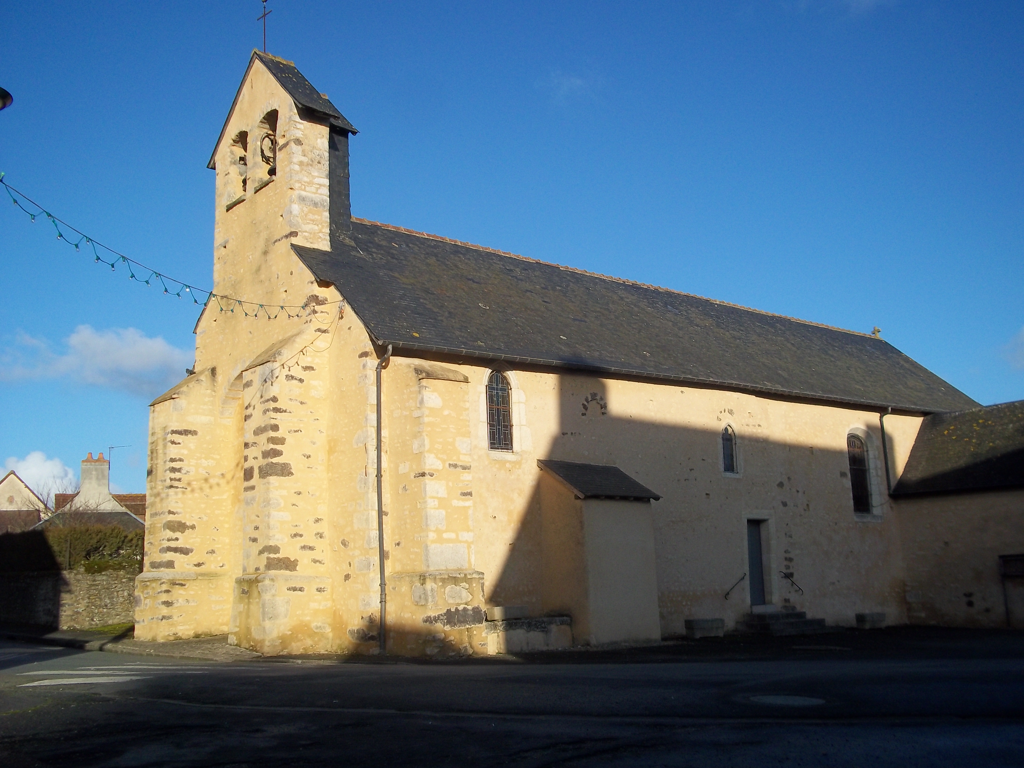 L'Eglise - Cure -Sarthe